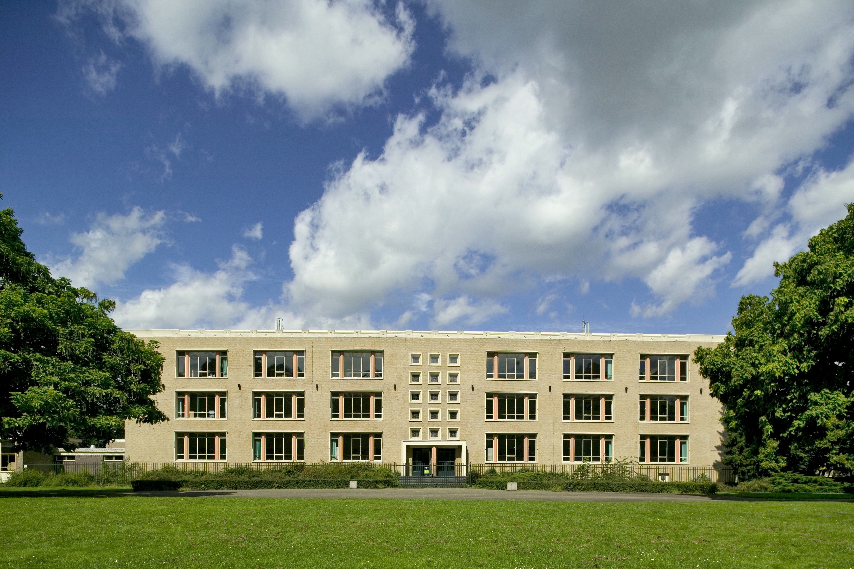 Catharinalyceum: Overzicht van de achtergevel (opmerking: Gefotografeerd voor Monumenten van Herrezen Nederland, bladzijde 105)